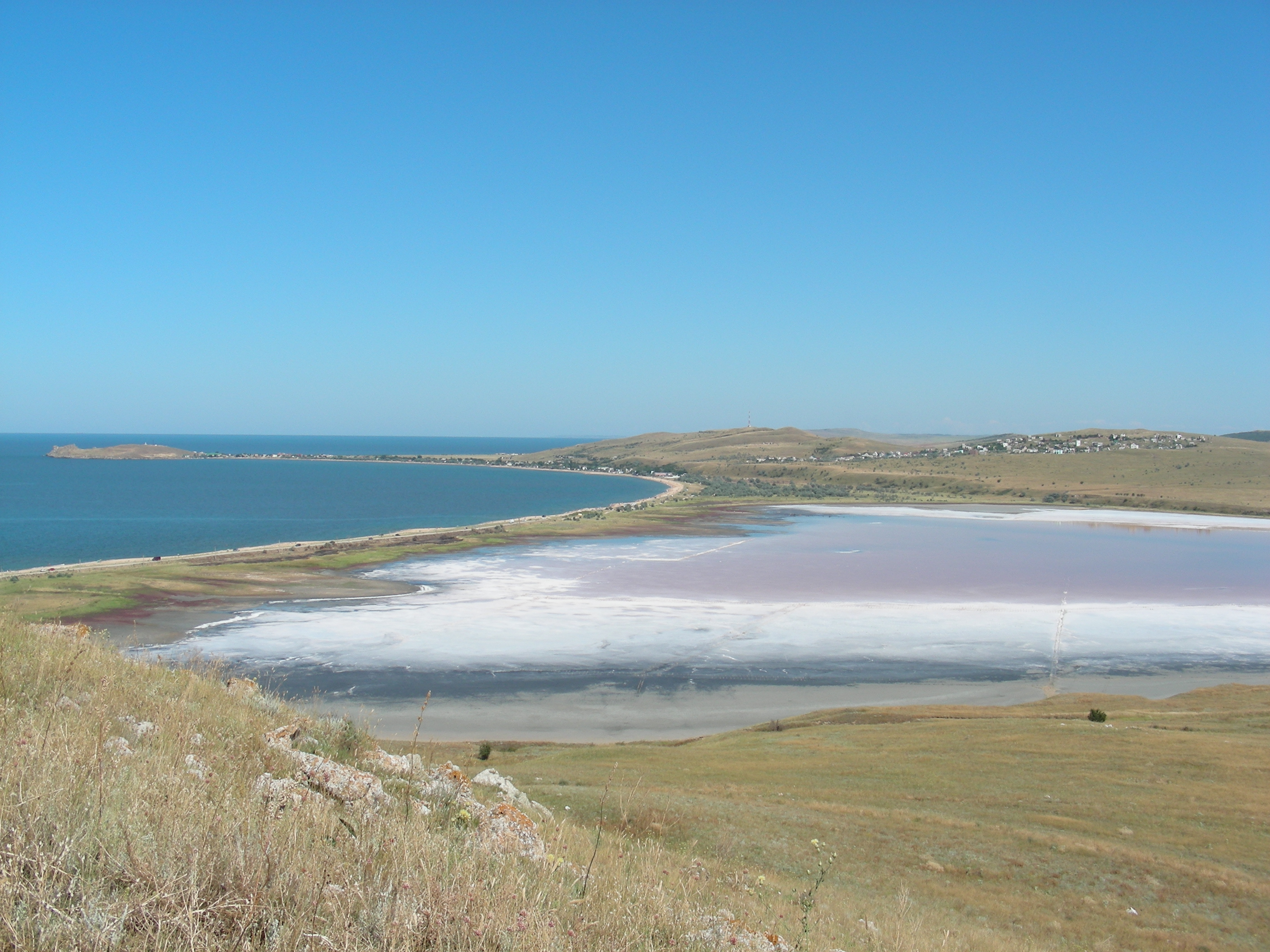 Озеро Чокрак, вид на северную часть озера и пересыпь, отделяющюю его от Азовского моря.